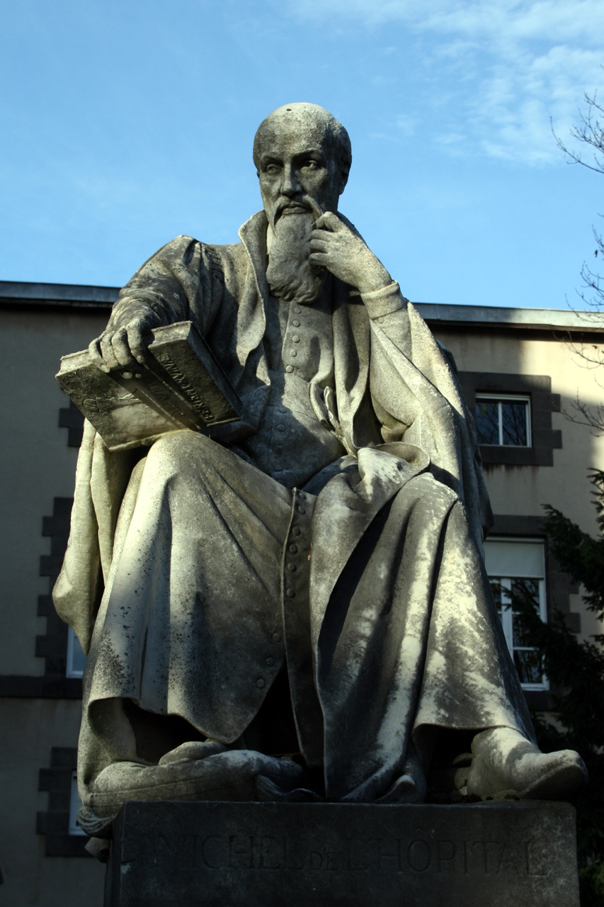 Statue de Michel de l'Hopital à Riom.